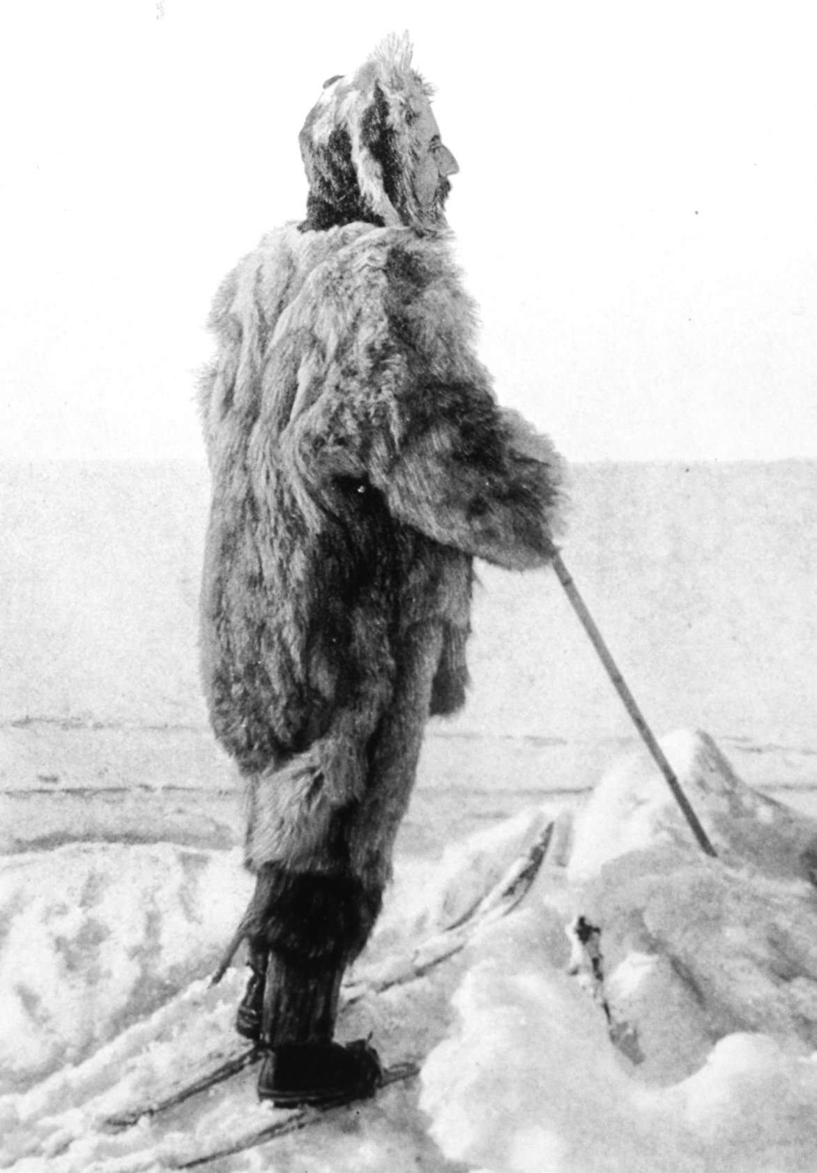 Norsk (bokmål): Roald Amundsen ved Svartskog, Bunnefjorden, 7. mars 1909